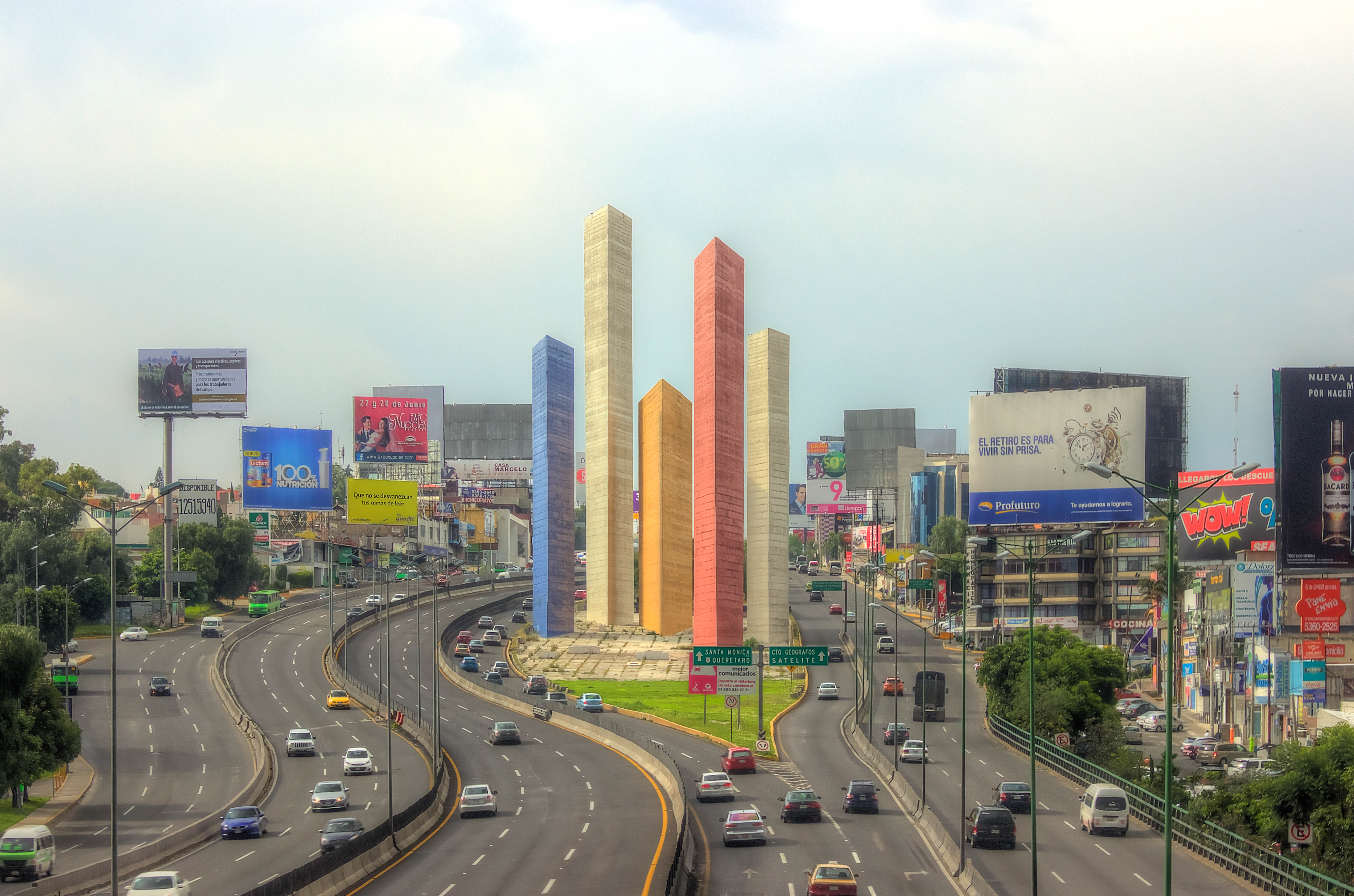 Torres de Satelite 4